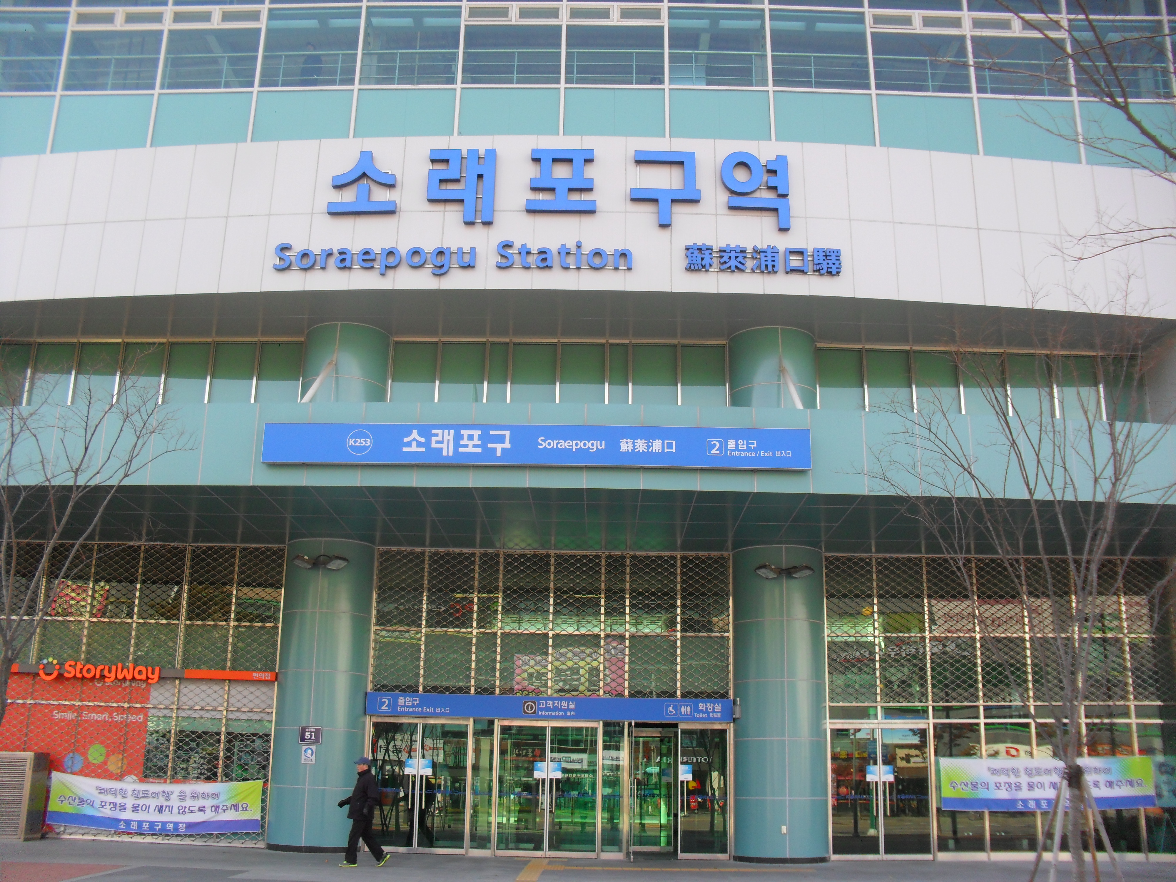 소래포구역 2번 출입구